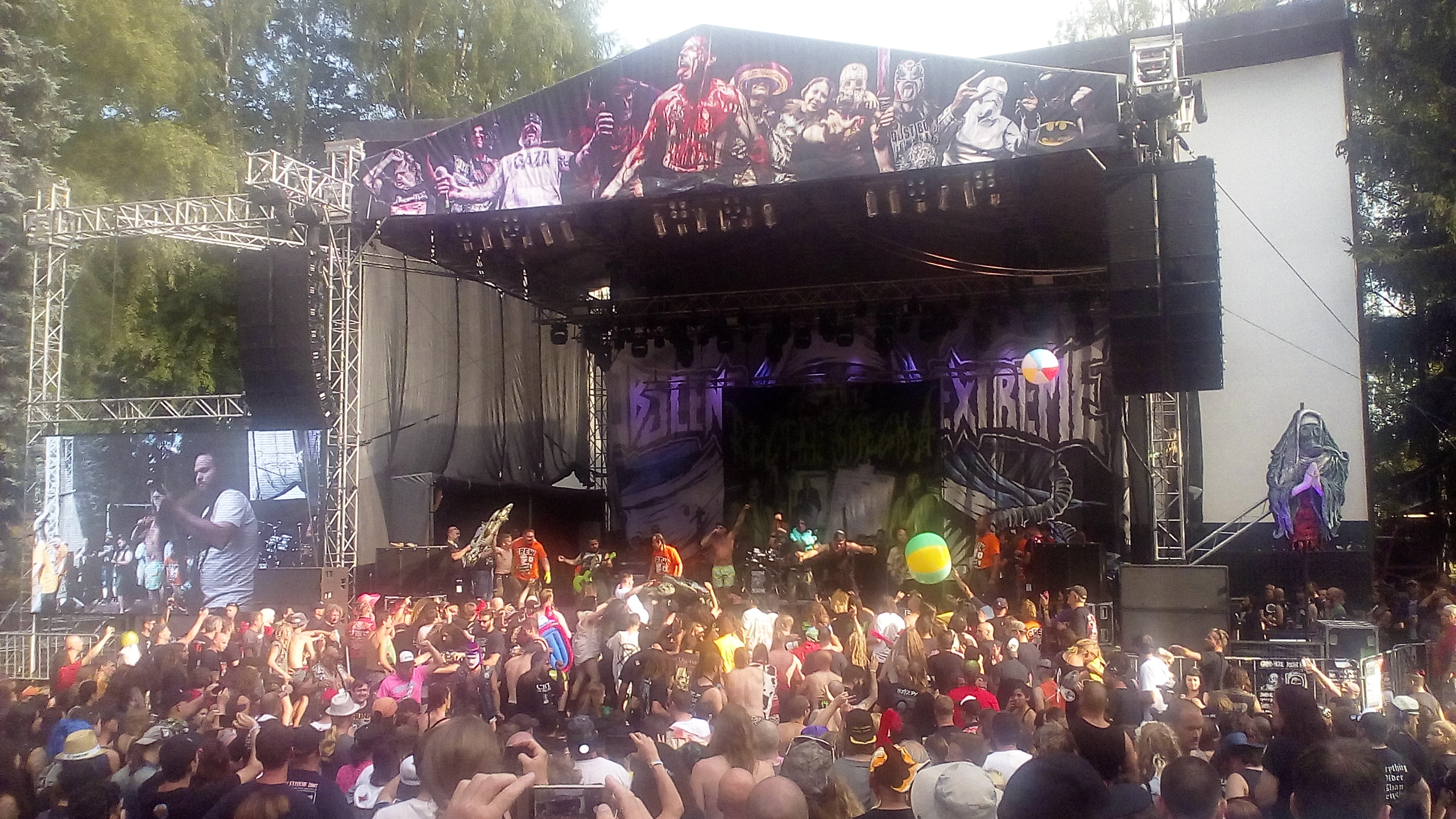 Obscene Extreme 20th Anniversary 2018